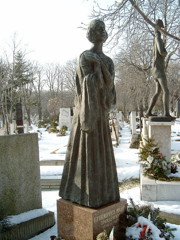 Gyurkovics Mária és Forrai Miklós sírja Budapesten. Farkasréti temető: 25-10-11/12.